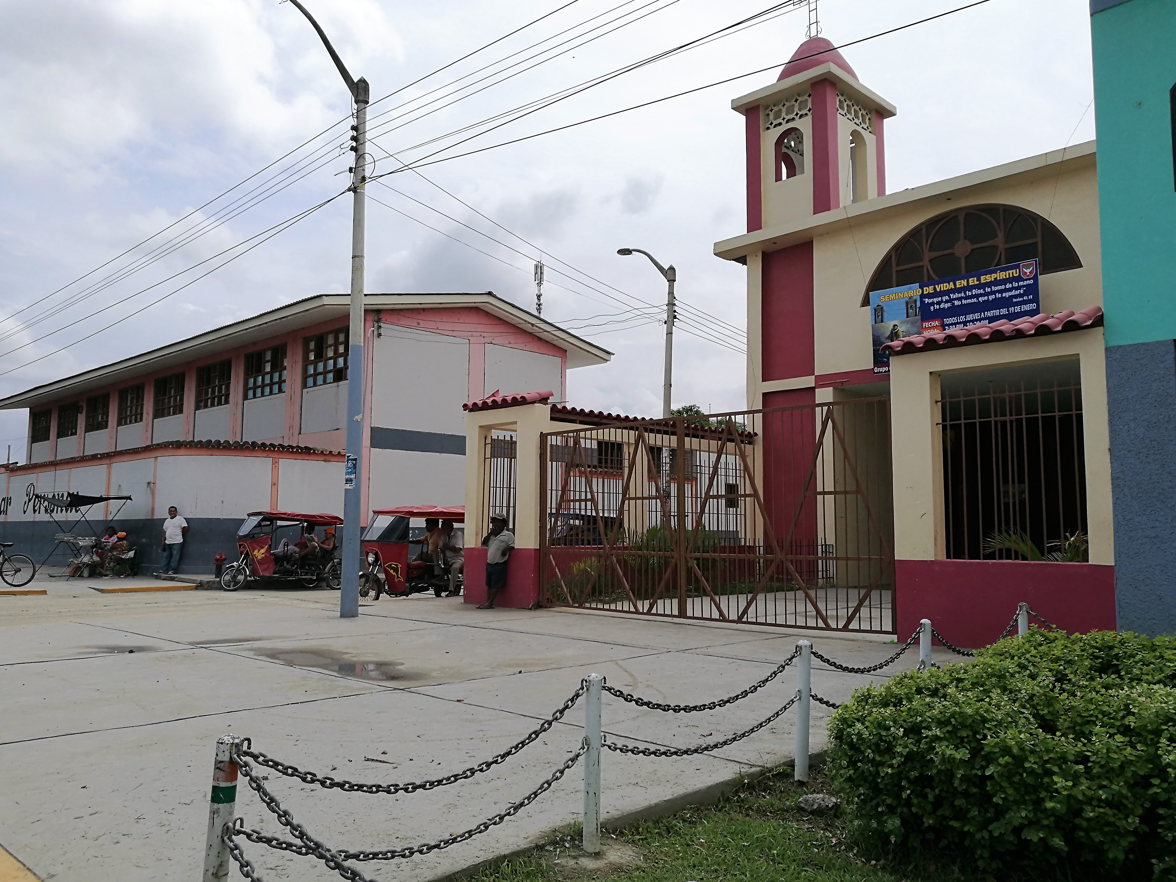 Església al carrer Ramón Castilla de Chulucanas